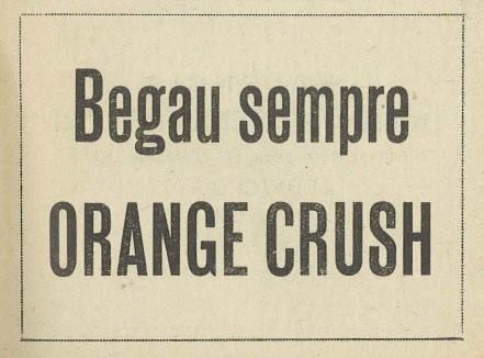 Anunci de l'Orange Crush a la revista "Nostra Novela" (sic).